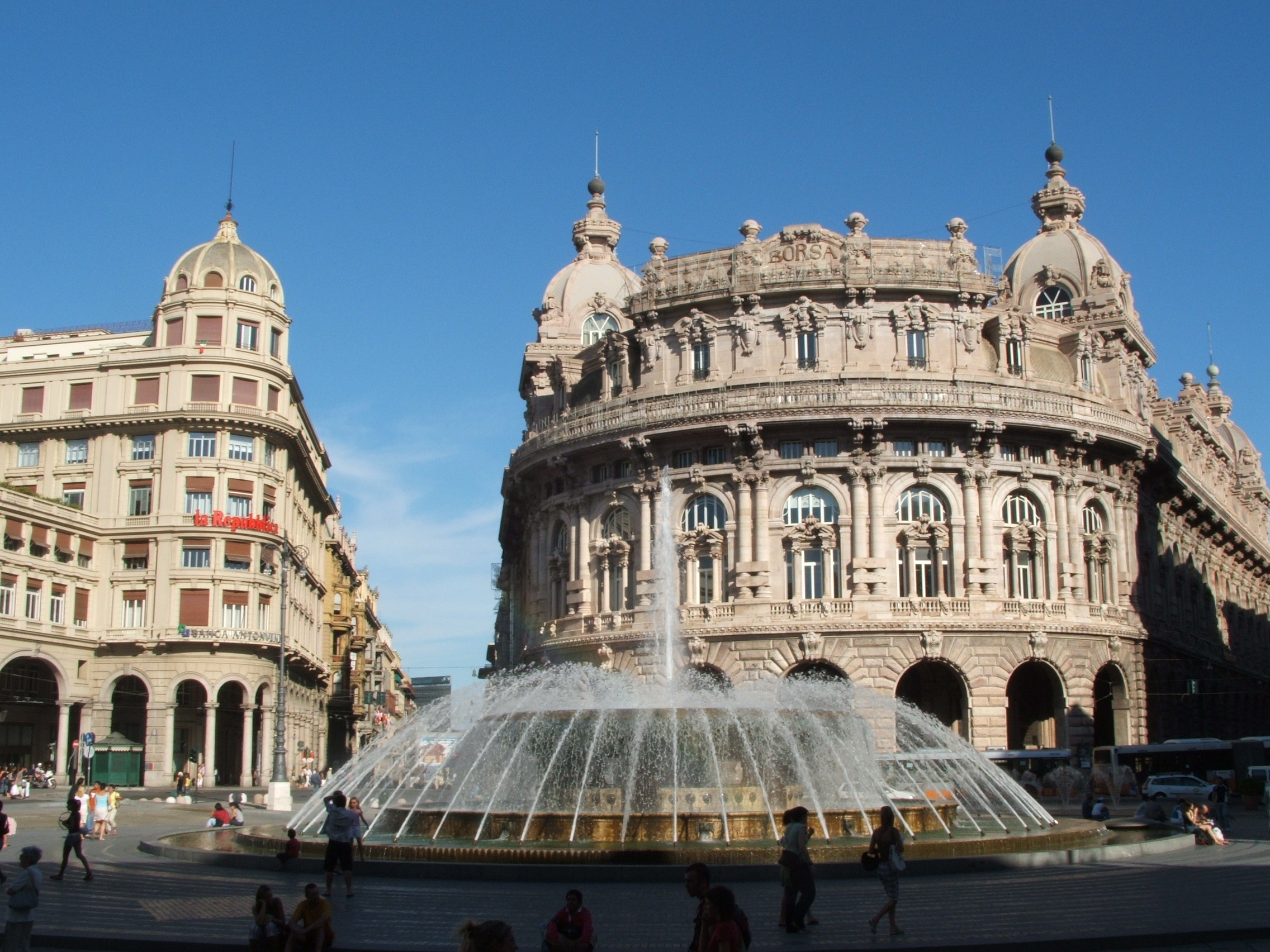 Immagine da Genova